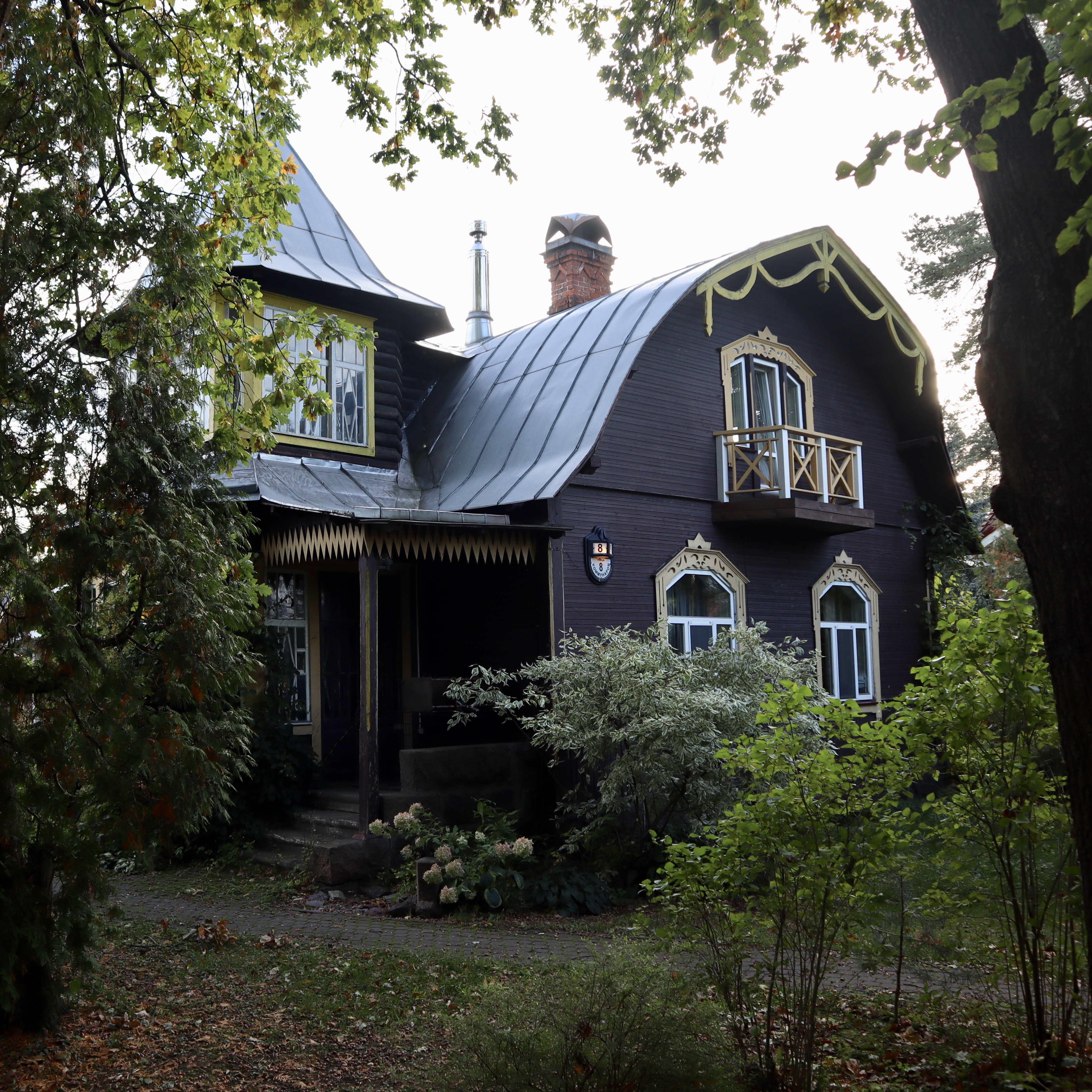 Дача Лобановых (деревянная двухэтажная): улица Коммунаров, 8, Ольгино, Приморский район, Санкт-Петербург